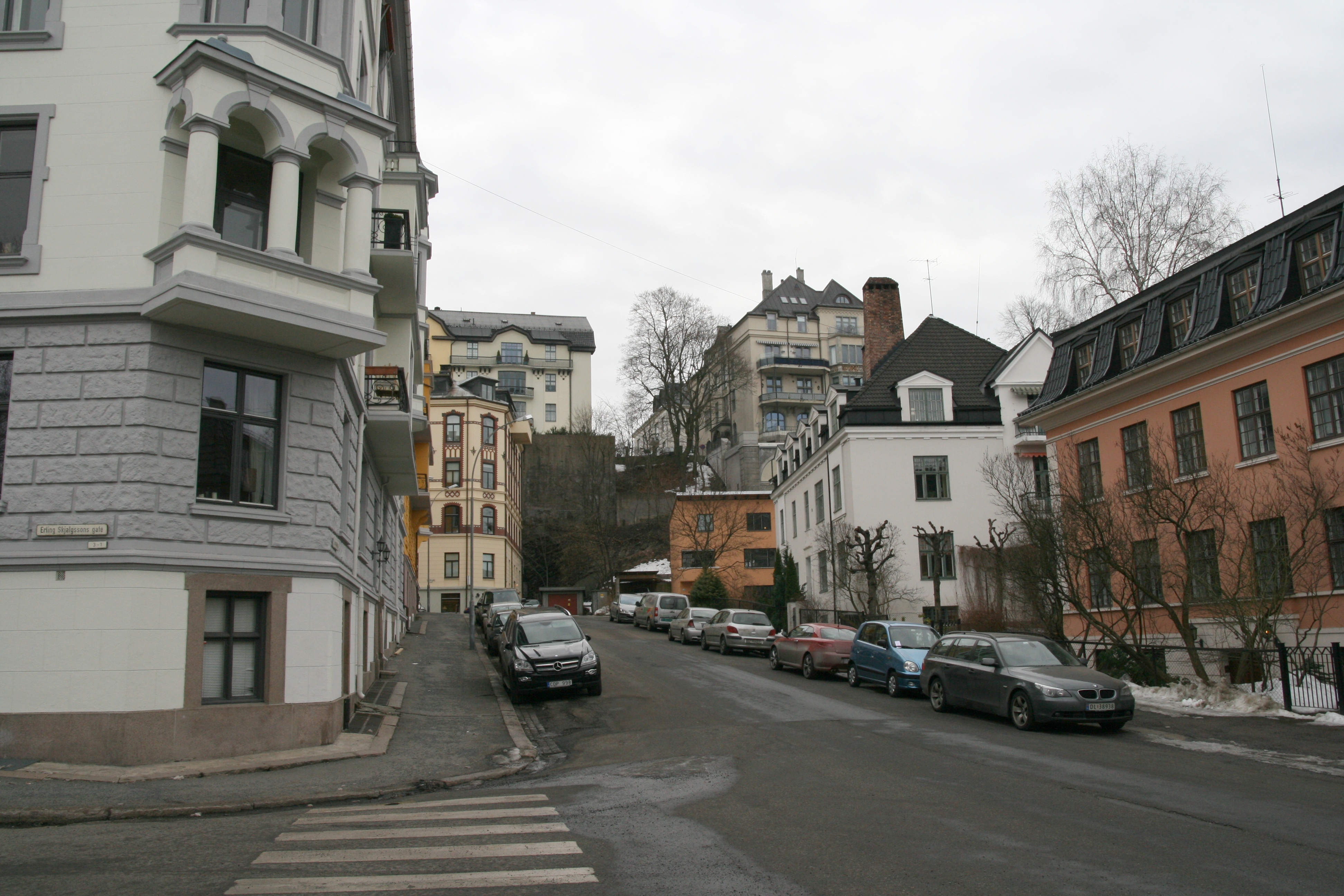 Hjørungavåggata på Frogner i Oslo, sett fra Erling Skjalgssons gate. De to bygningene på toppen i bakgrunnen ligger i enden av Gimle terrasse